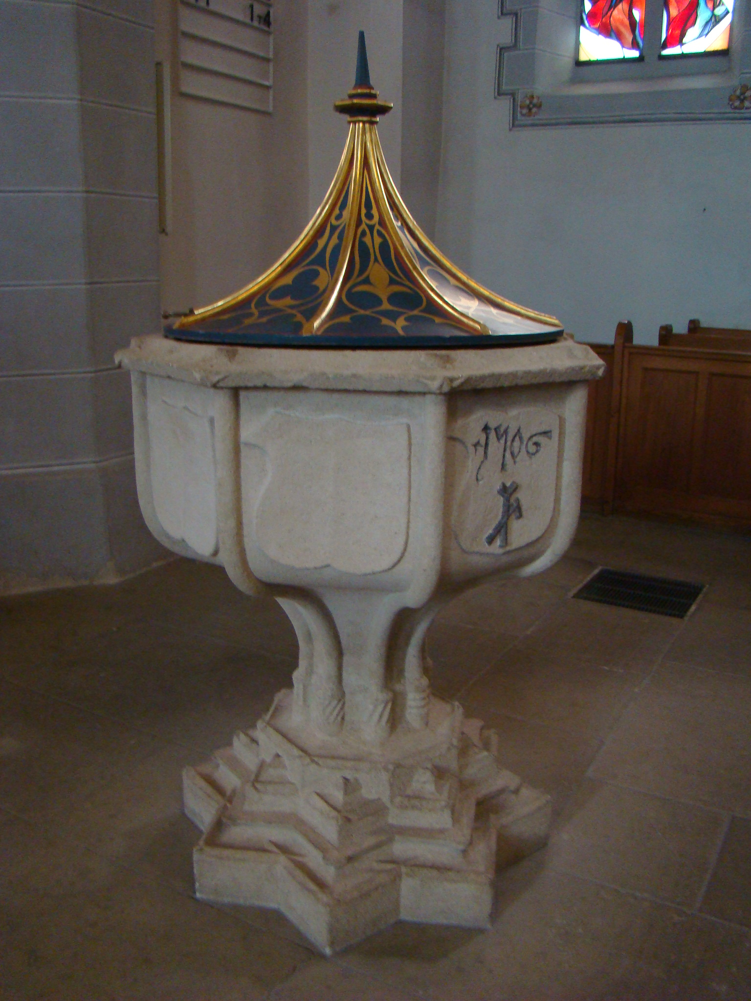 Münsingen